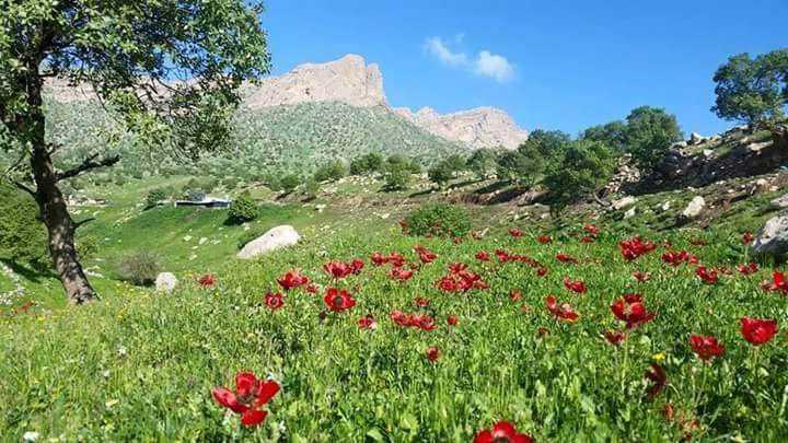 کوردی: گوندی زارێن لە بەهاردا